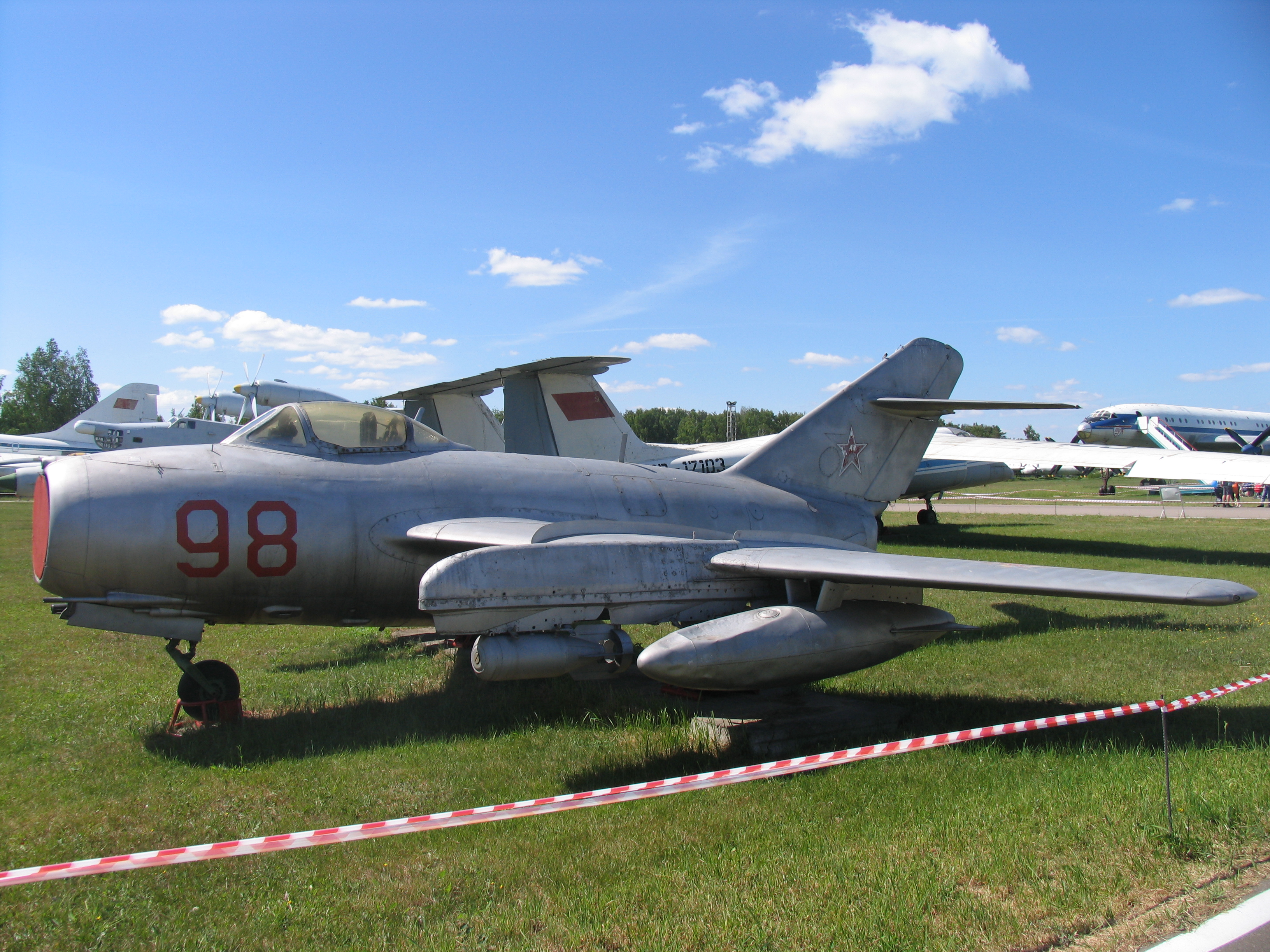 МиГ-15бис (ИШ) в Центральном музее ВВС.